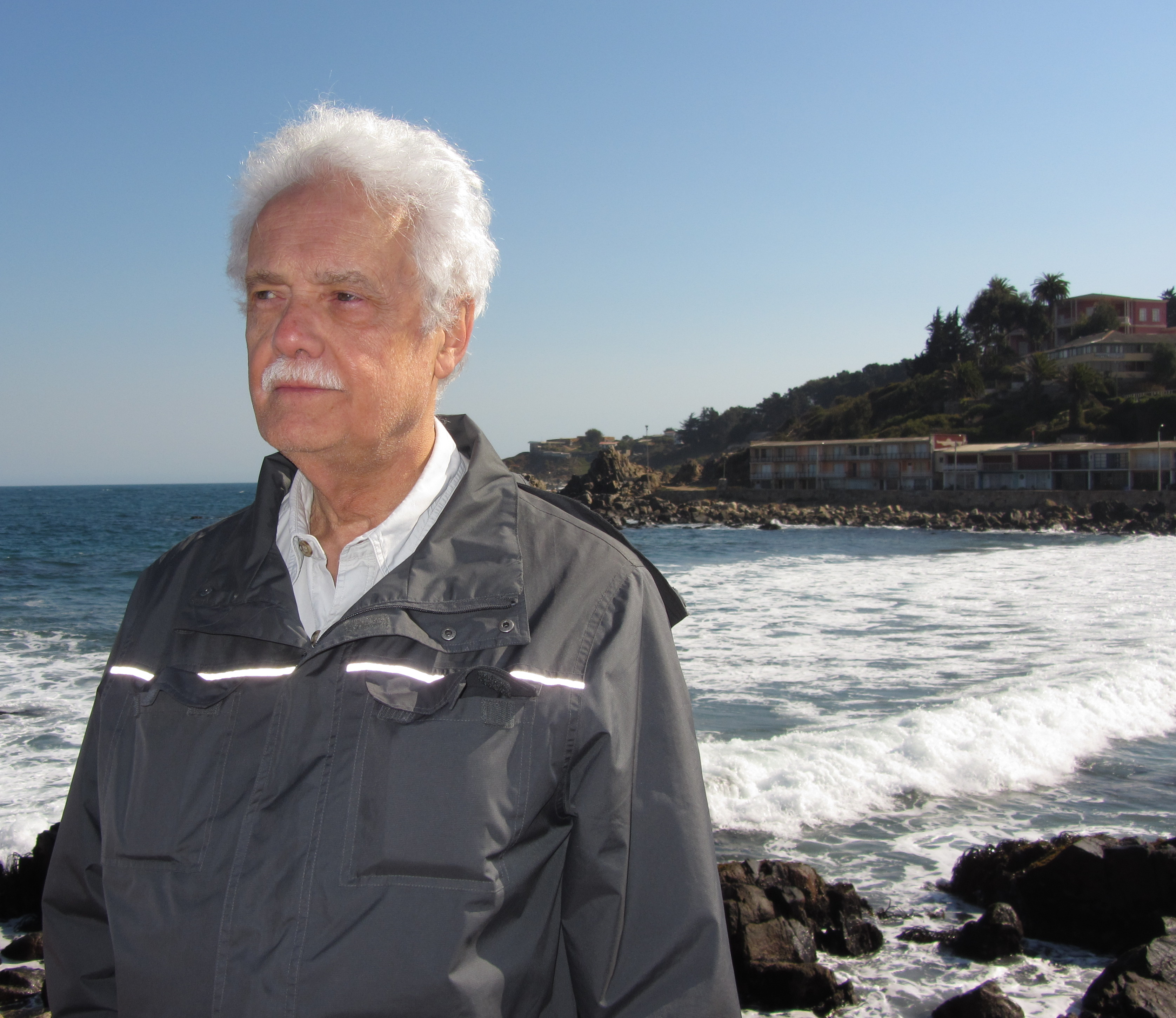 El escritor chileno Eduardo Labarca en Las Cruces, donde vive.